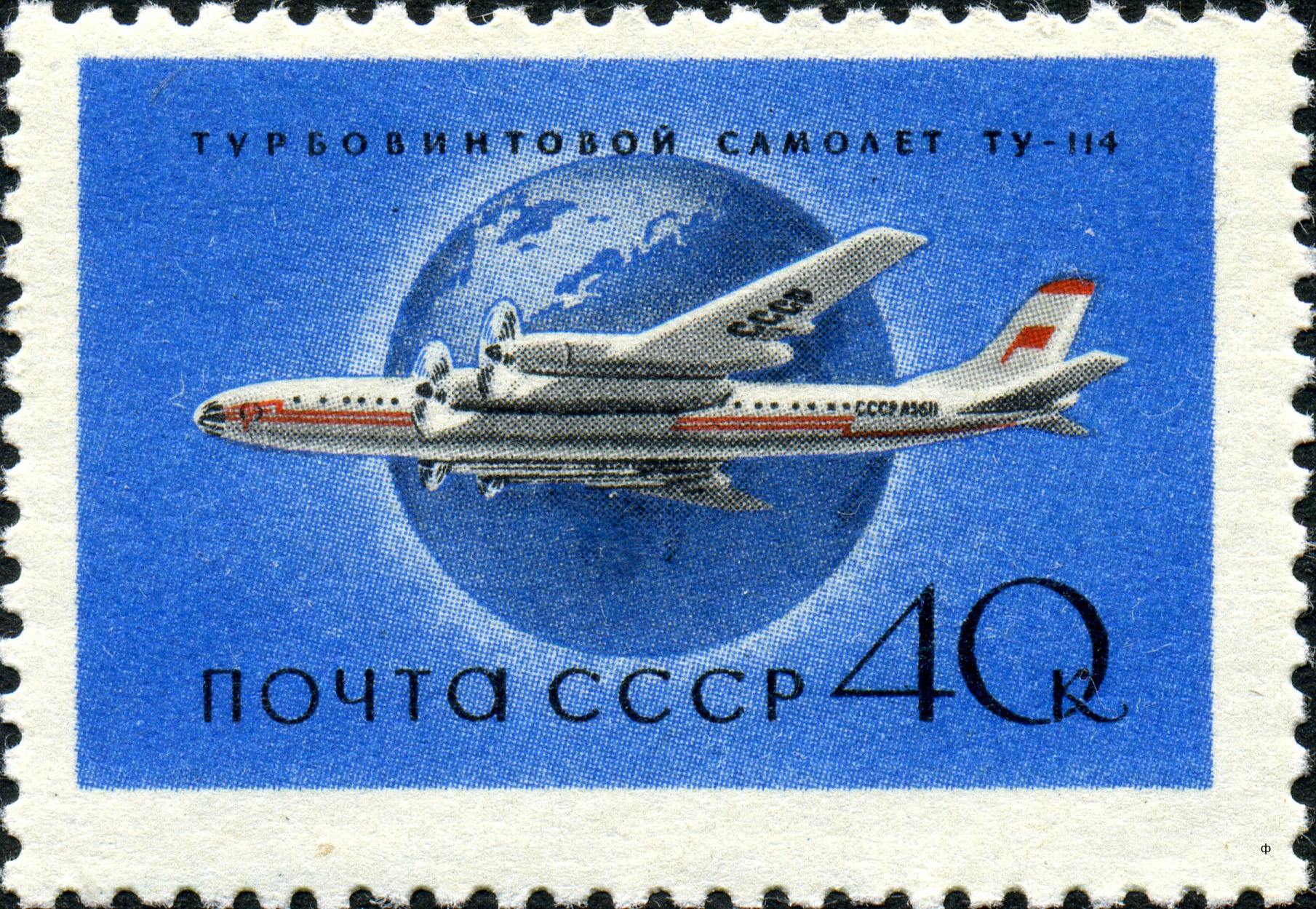 Марка СССР